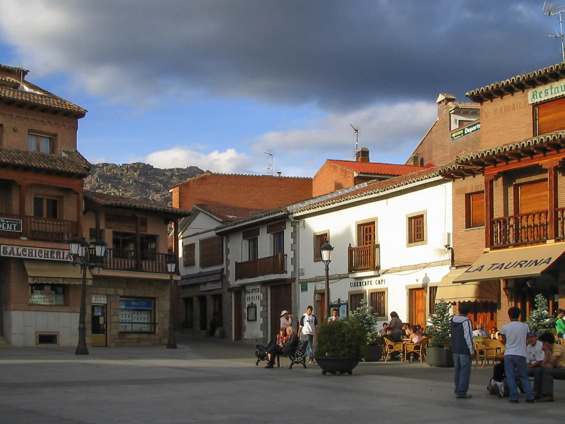 Plaza céntrica en Manzanares el Real.